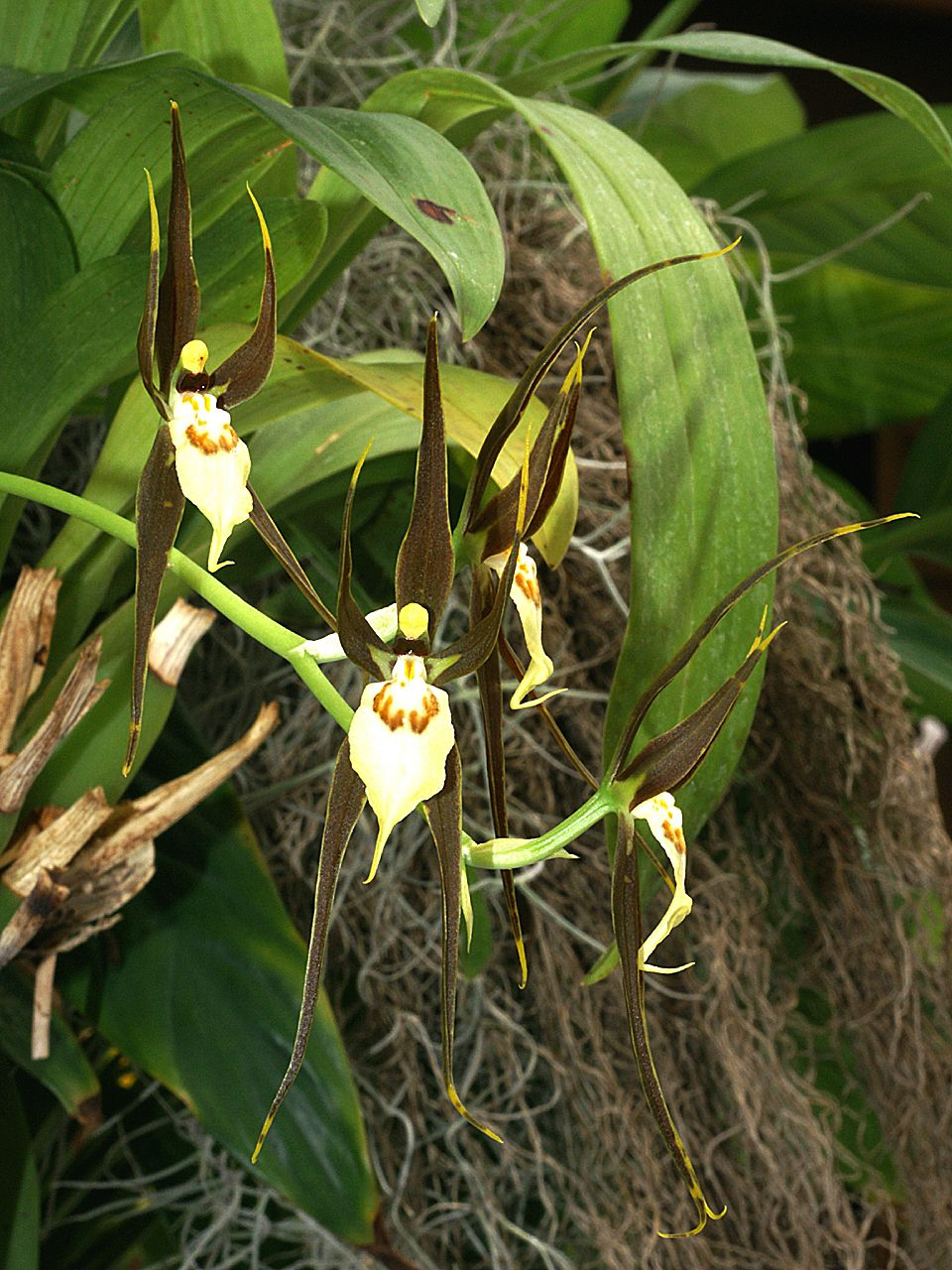 Brassia keiliana